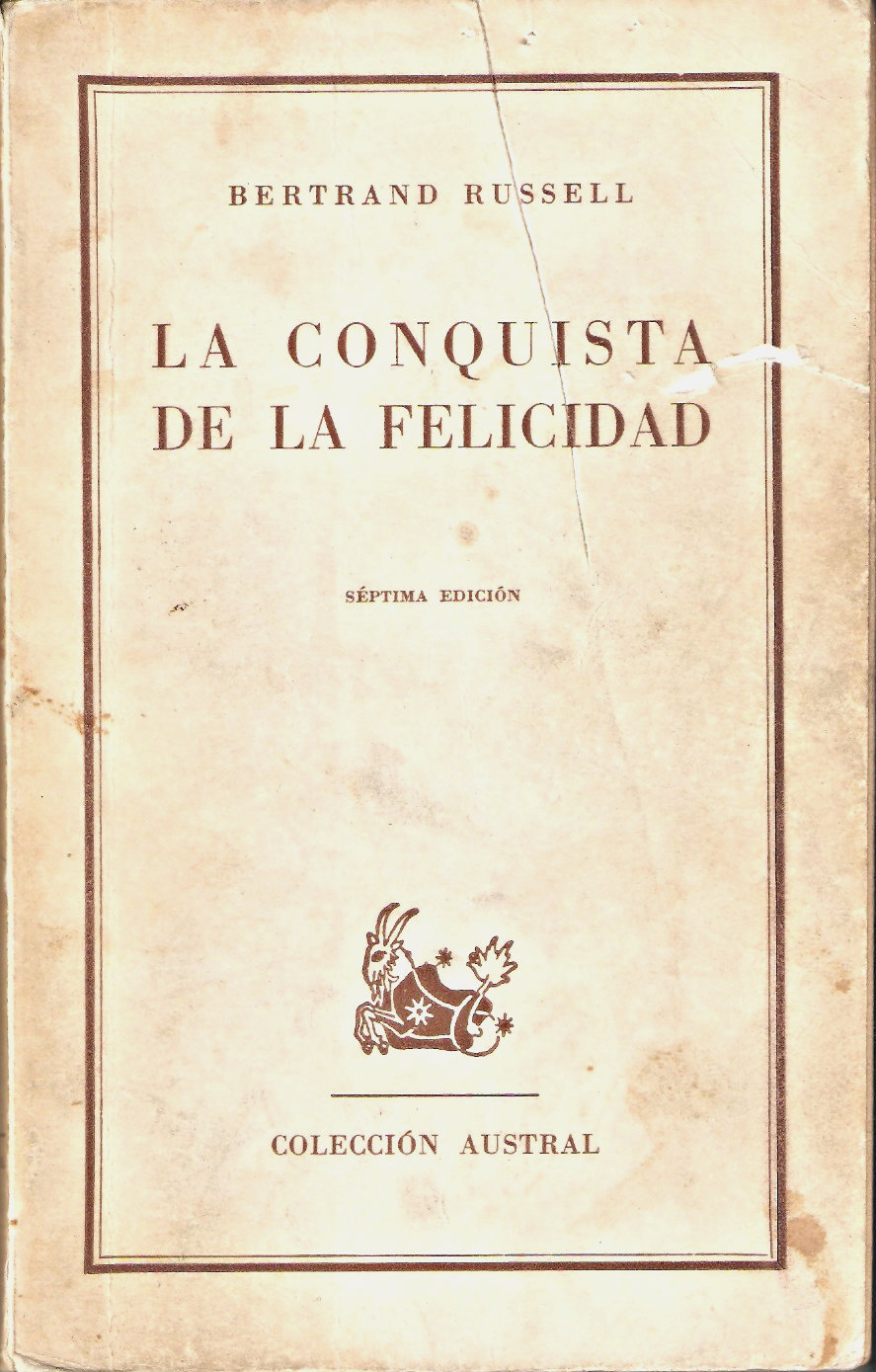 Portada de: La conquista de la felicidad. BERTRAND RUSSELL. Colección Austral. (Séptima edición) Traducción de J. Huici [Madrid], Espasa-Calpe, S. A. [1964]